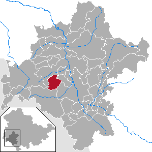 Stepfershausen in Thuringia - District Schmalkalden-Meiningen